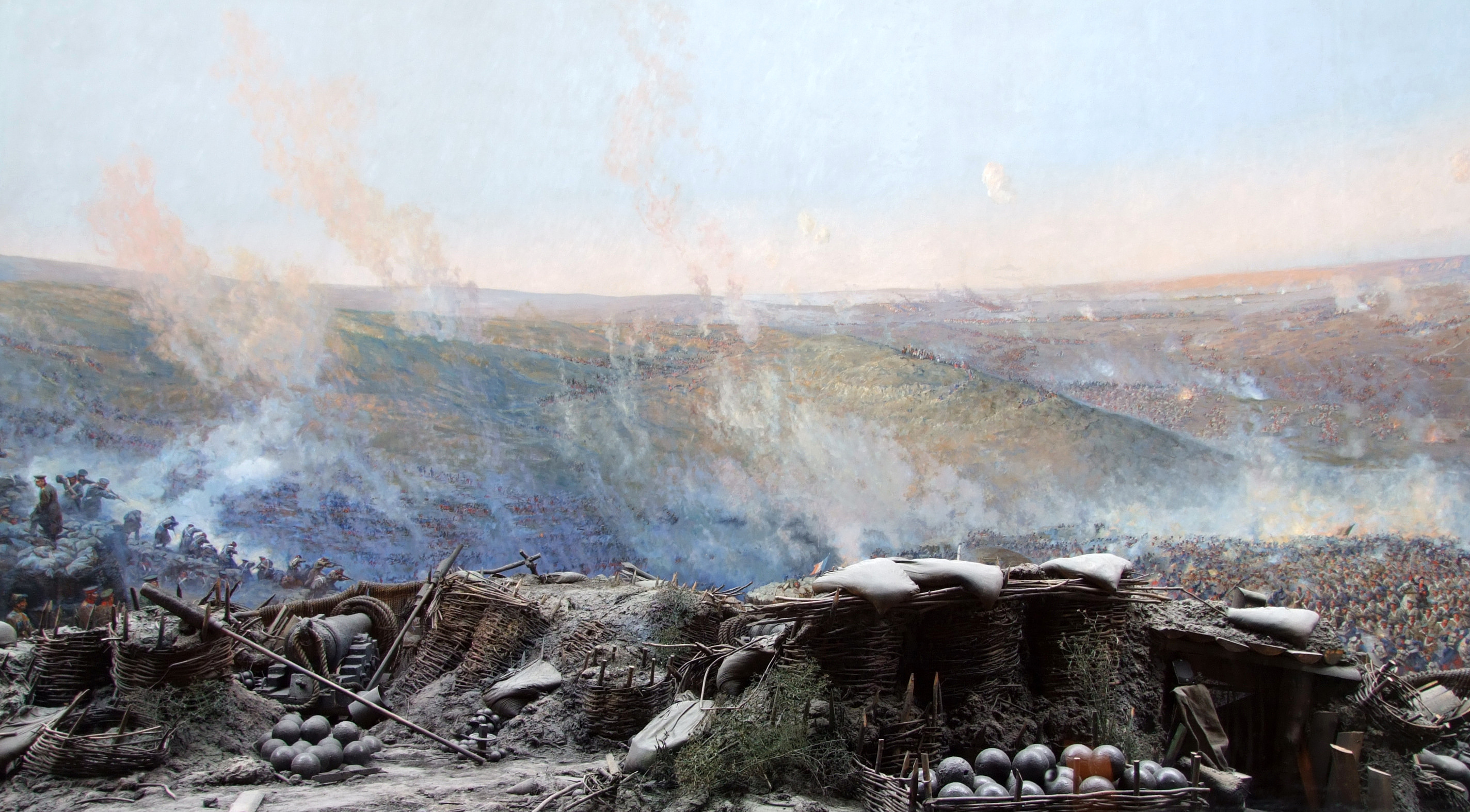 Меморіальний комплекс пам'яток оборони міста в 1854 - 1855 роках "Історичний бульвар" 1905 - 1959 роки